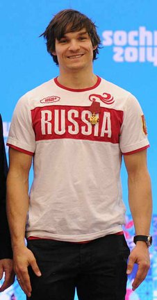 Орденом «За заслуги перед Отечеством» четвёртой степени награждён двукратный олимпийский чемпион в сноуборде Виктор Вайлд.